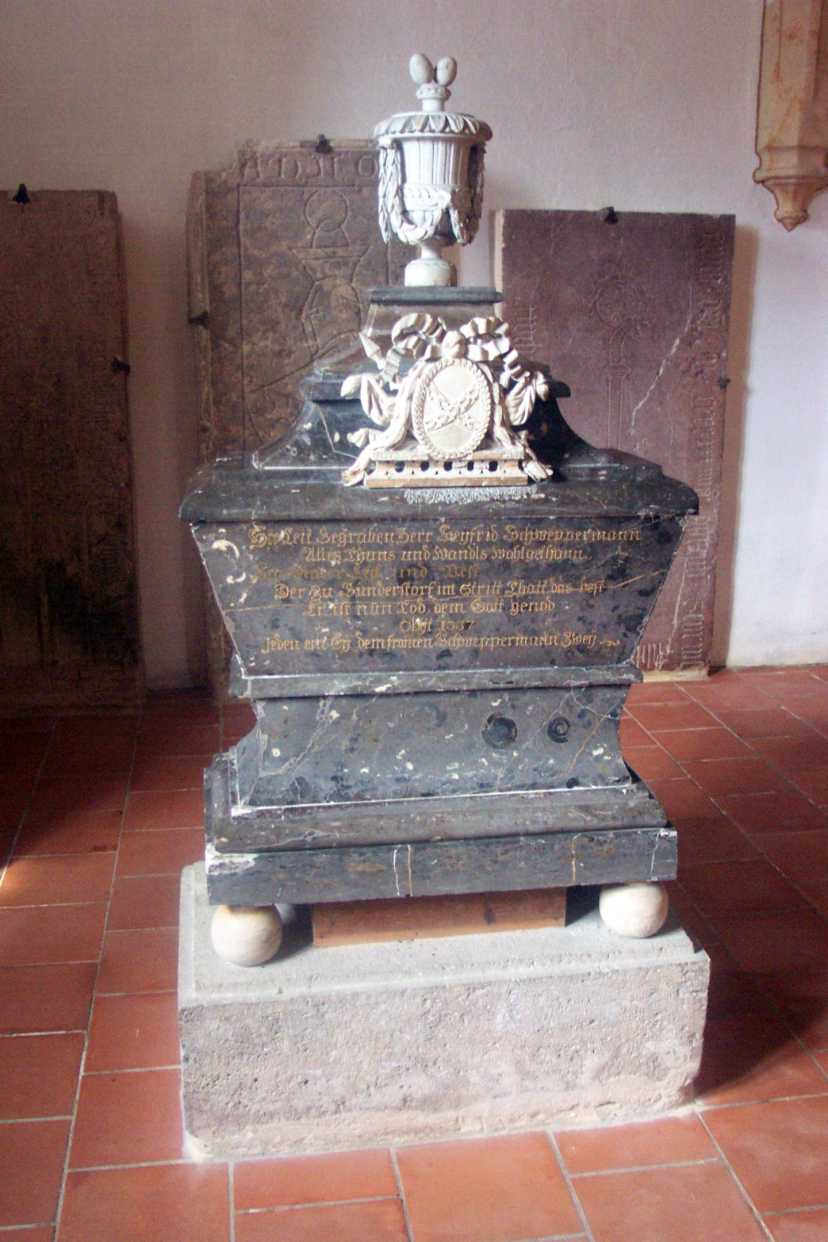 Ehrentumba für Seyfried Schweppermann in der Klosterkirche Kastl. Als Anspielung an die bekannte Schweppermannsage wird das Denkmal von einer Vase mit zwei Eiern bekrönt. Die Inschrift auf der Vorderseite lautet: Hie Leit Begraben Herr Seyfrid Schweppermann Alles Thuns und Wandls wohlgethan, Ein Ritter Keck, und Vest Der Zu Sündersdorf im Stritt Thatt das best Er ist nun Todt, dem Gott genod obiit 1337 Jedem ein Ey dem from[m]en Schweppermann Zwey.